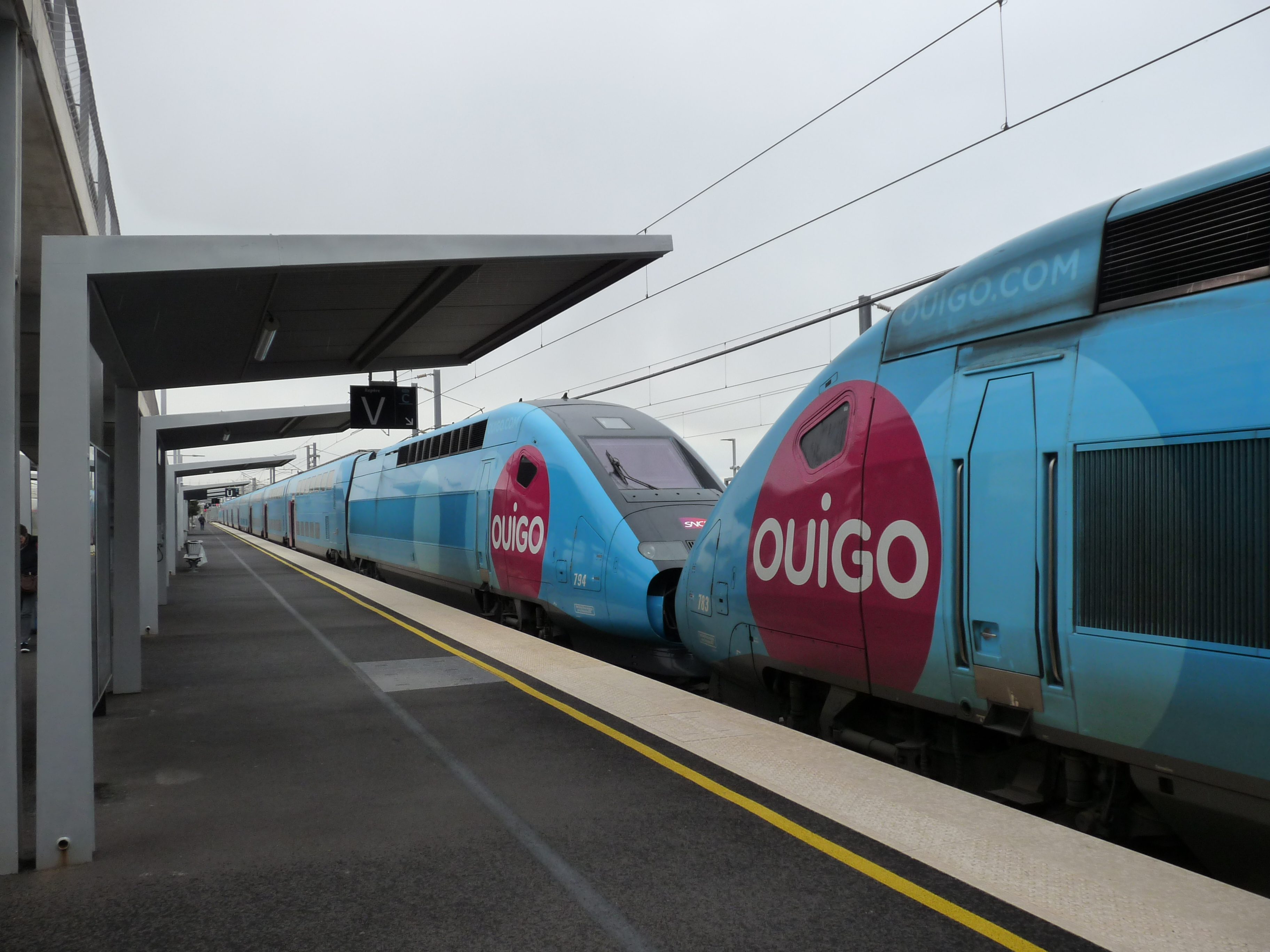 Twee Ouigo treinstellen in Montpellier-Sud-de-France